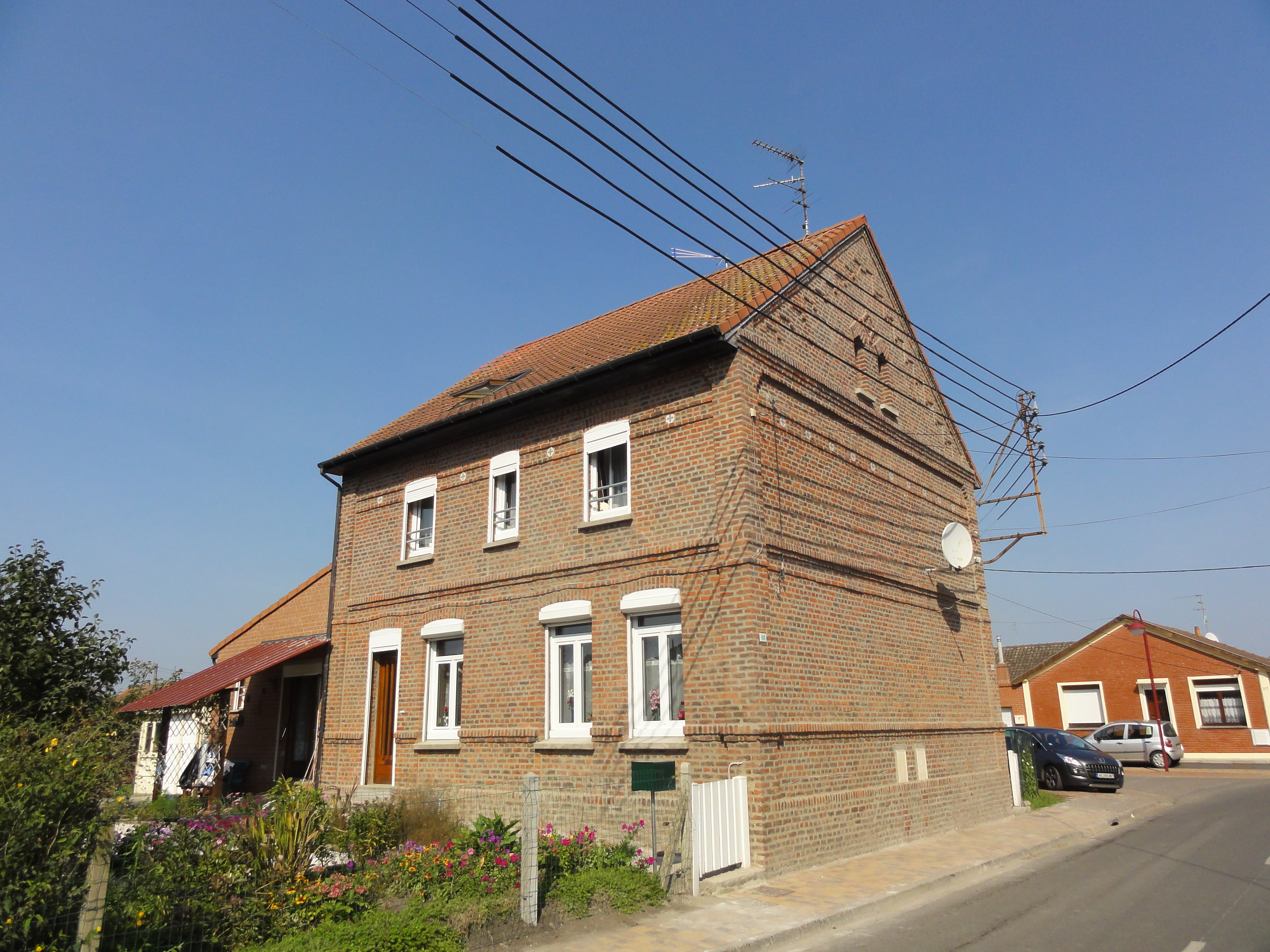 Cité du Tournant de la fosse Saint-Pierre de la Compagnie des mines de Thivencelle dans le bassin minier du Nord-Pas-de-Calais, Thivencelle, Nord, Nord-Pas-de-Calais, France.